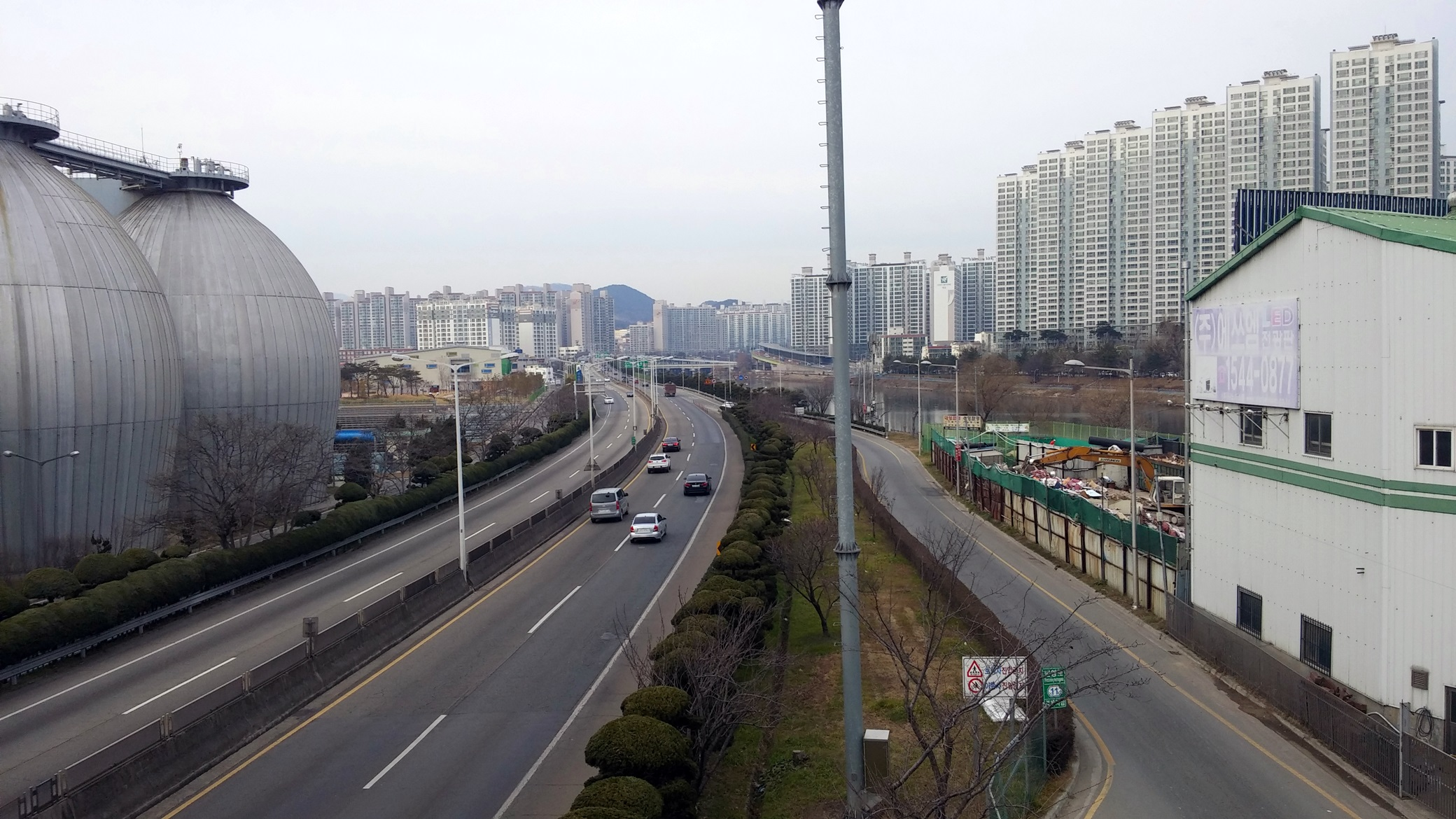 번영로 원동IC 방향, 과정교 위에서 촬영.